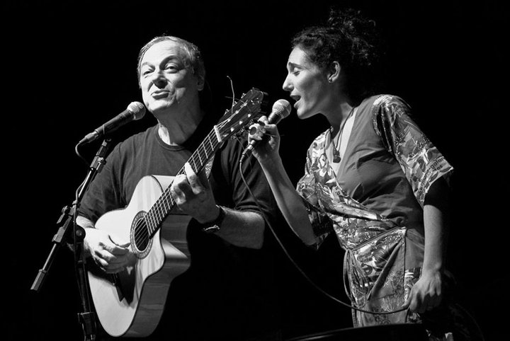 Participação especial de Badi Assad na apresentação de Toquinho na "32ª Semana Guiomar Novaes" em São João da Boa Vista.